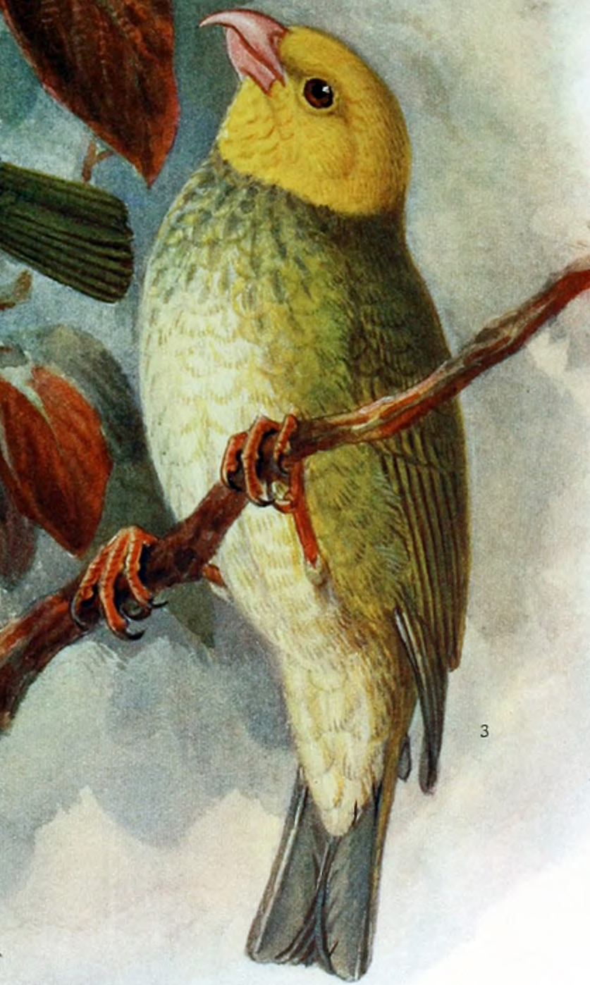 Вьюрковая цветочница-оу